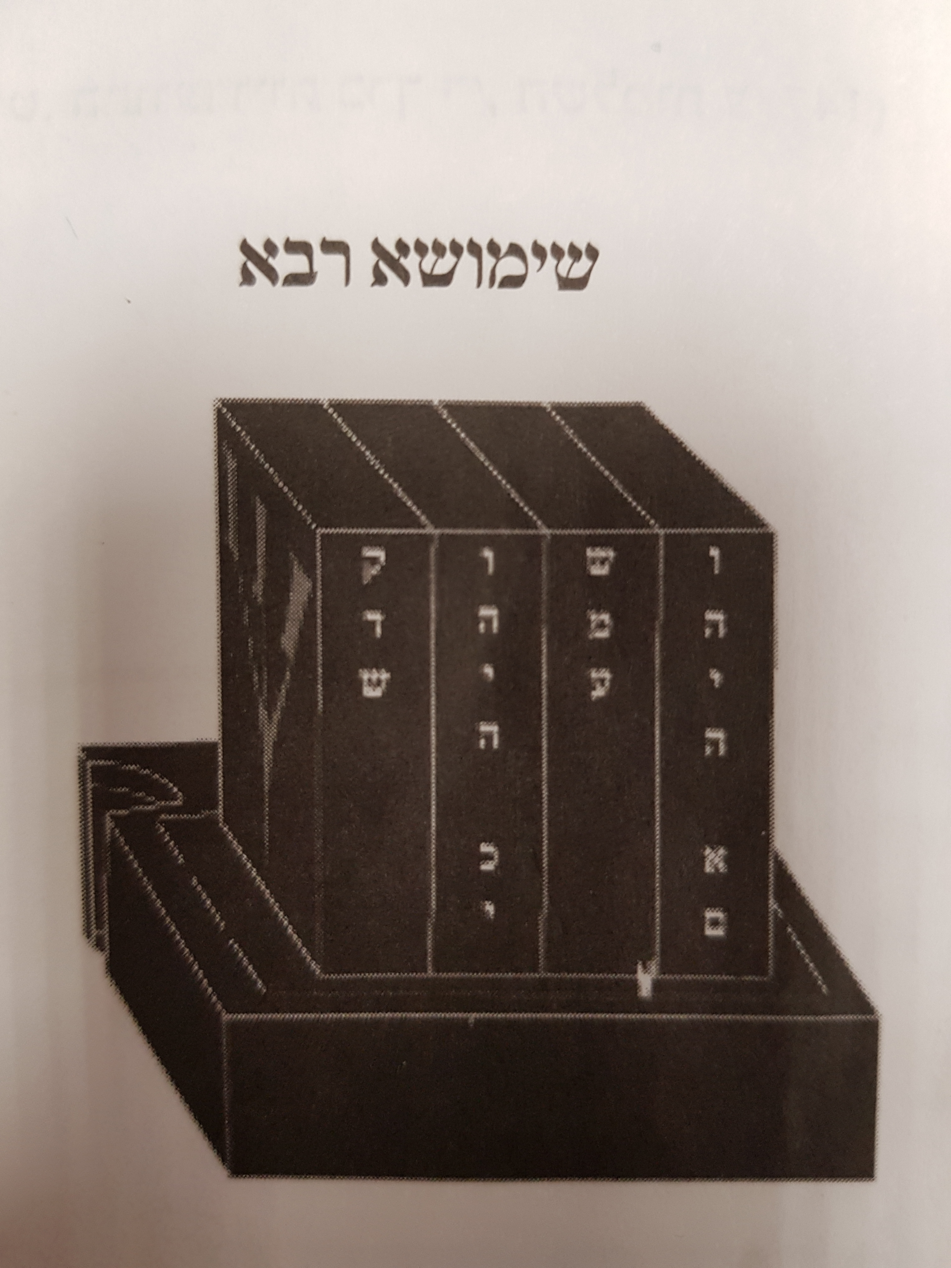 תיאור תפילין של ראש של שימושא רבא